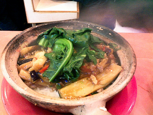 Cantonese cuisine little bowl rice 煲仔飯Cantonese cuisine little bowl rice